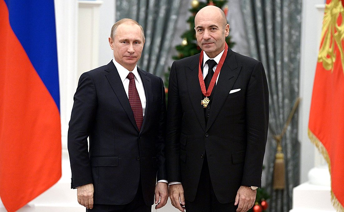 Церемония вручения государственных наград РФ. Орденом «За заслуги перед Отечеством» III степени награждён композитор Игорь Крутой